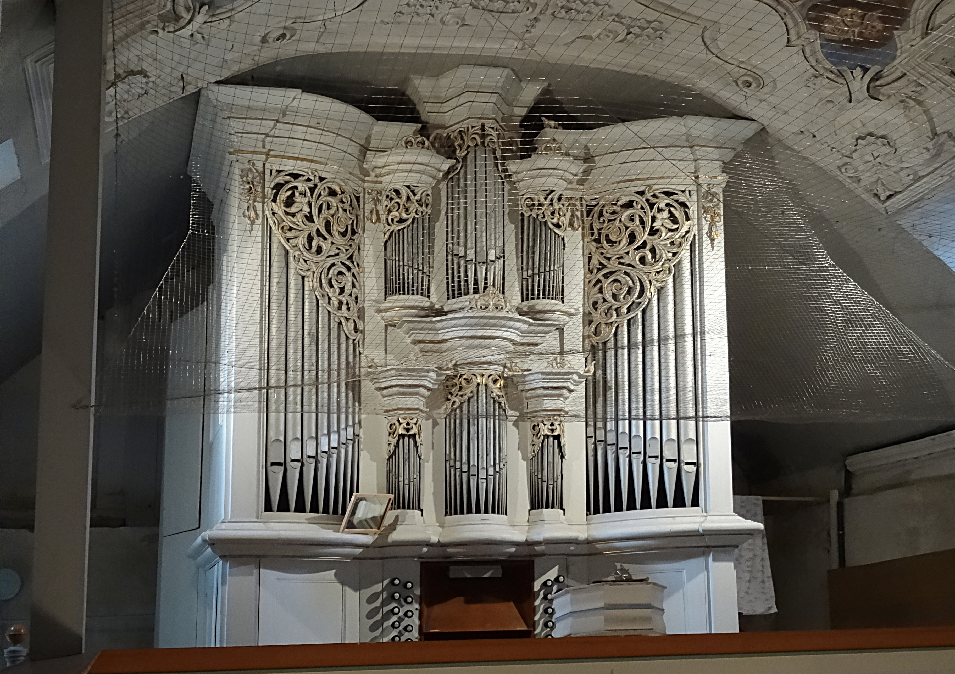 Orgel von Johann Georg Schröter (1734-43 IIP/23) in St. Peter und Paul (Andisleben)